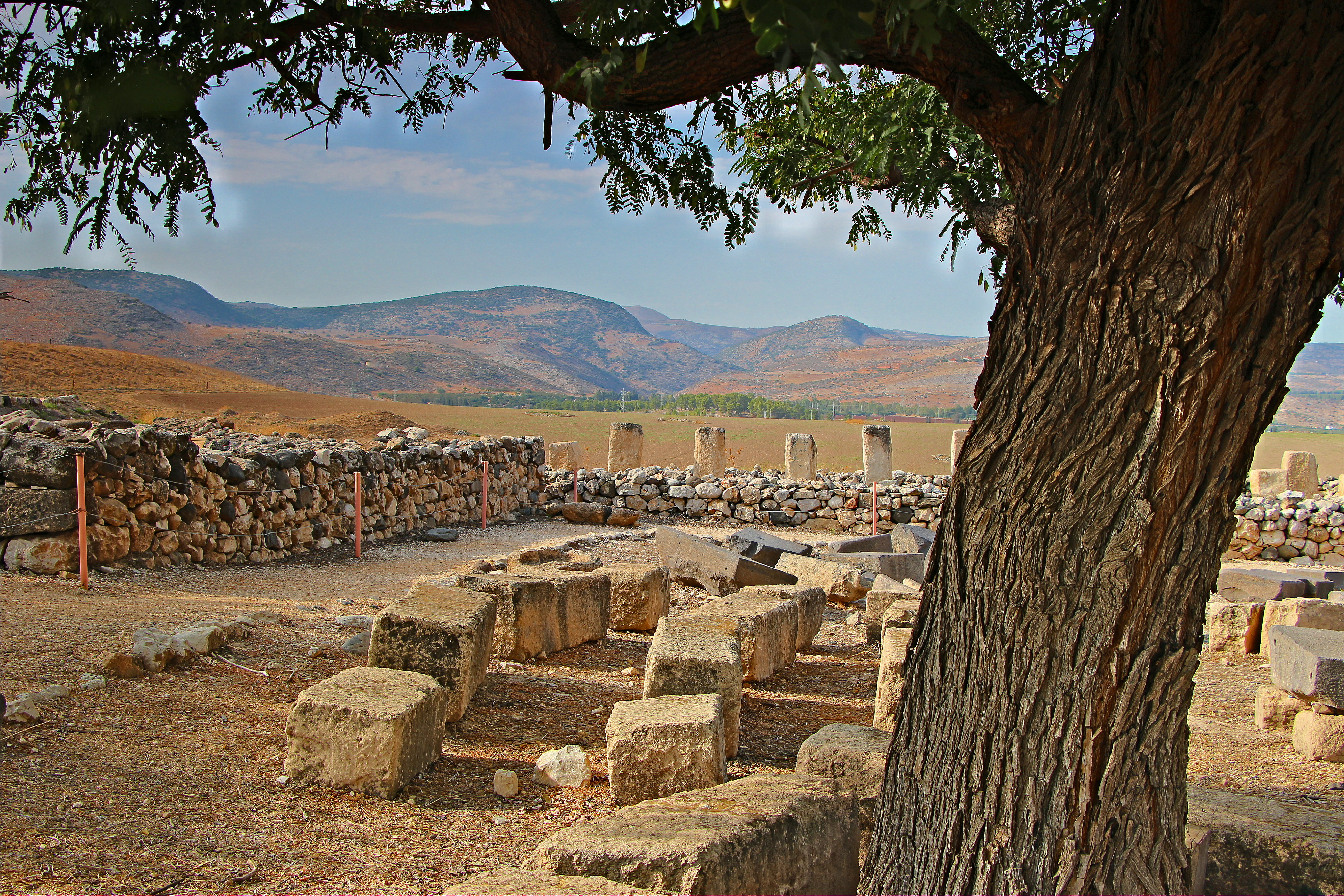 תל חצור הוא תל וגן לאומי השוכן בתל אל-קדח סמוך וממערב לאיילת השחר בגבולו הדרומי של עמק החולה. תל חצור משתרע על שטח של כ-840 דונם בין התוואי הישן והחדש של כביש 90 והוא הגדול מבין כ-200 תילים מקראיים ברחבי ישראל. על שמה של חצור ההיסטורית נקראה חצור הגלילית שקמה כמעברה ב-1953. בשנת 2005 הוכר תל חצור כאתר מורשת עולמית יחד עם תל מגידו ותל באר שבע. ביולי 2012 נתגלו ממצאים חדשים במקום אשר לדעת חוקרים, תומכים בסיפור המקראי של כיבוש ארץ ישראל על ידי יהושע בן נון.